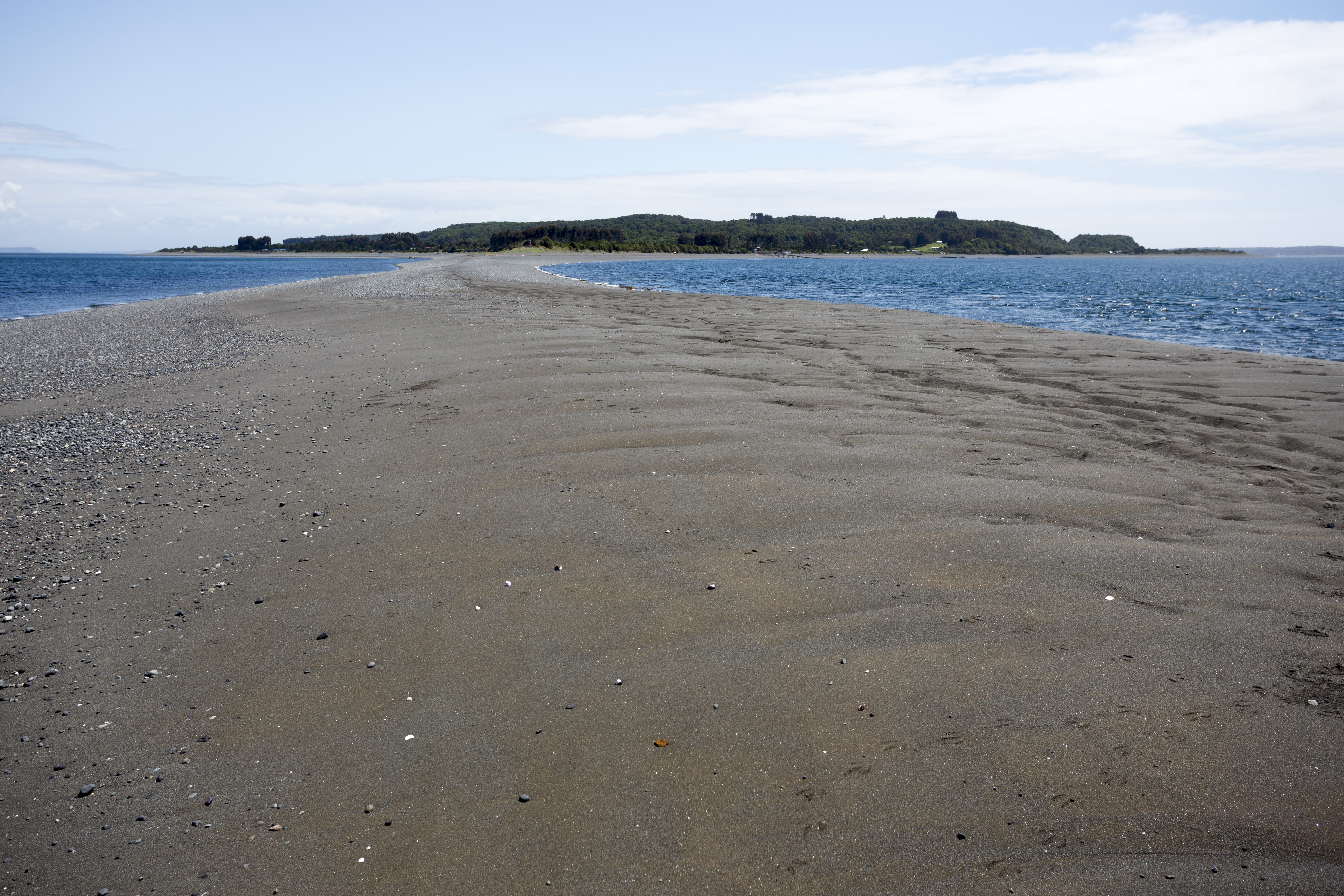 Punta Isla Cuit, grupo Desertores, Chaitén.